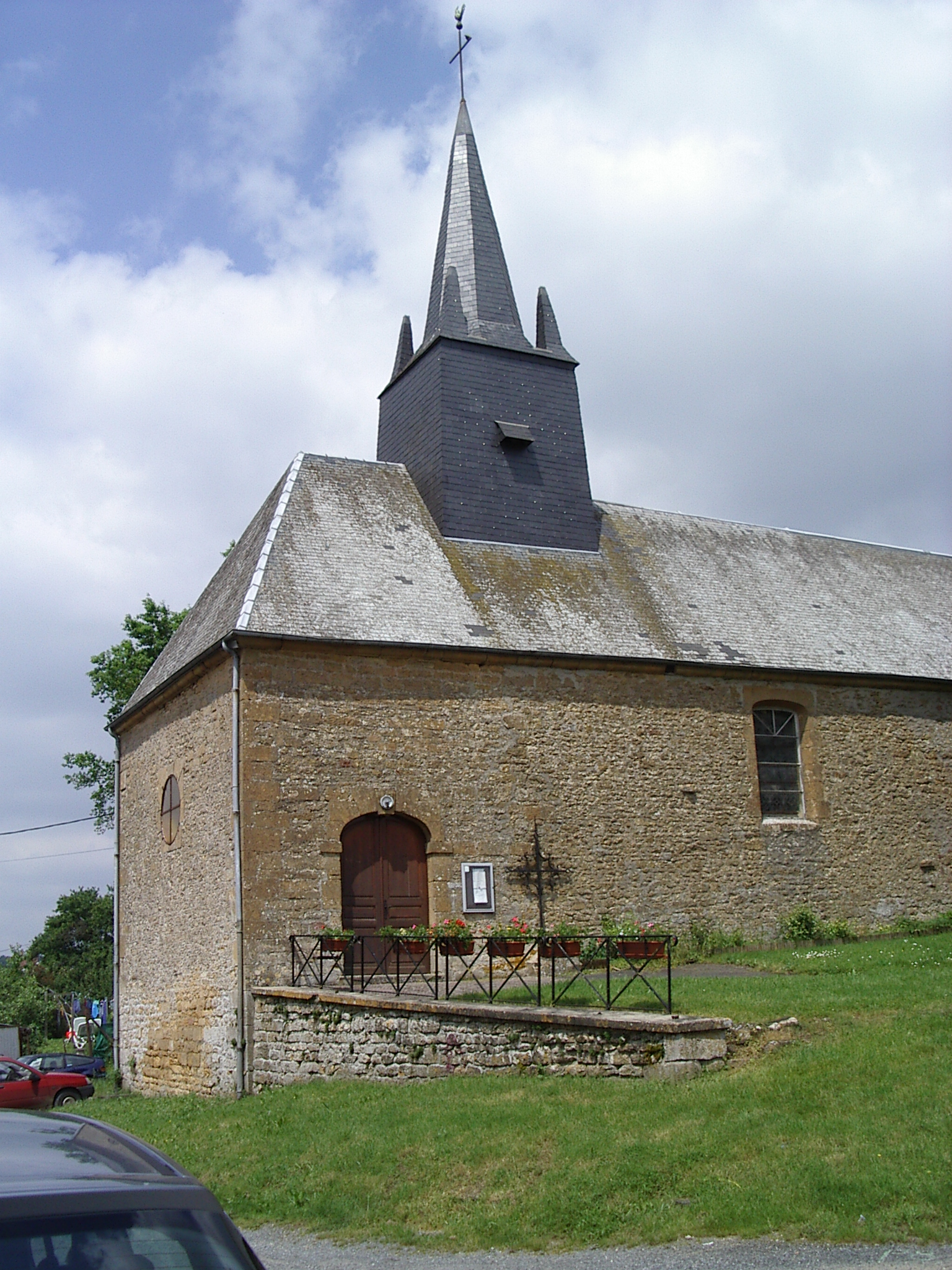 Eglise village de Chalandray